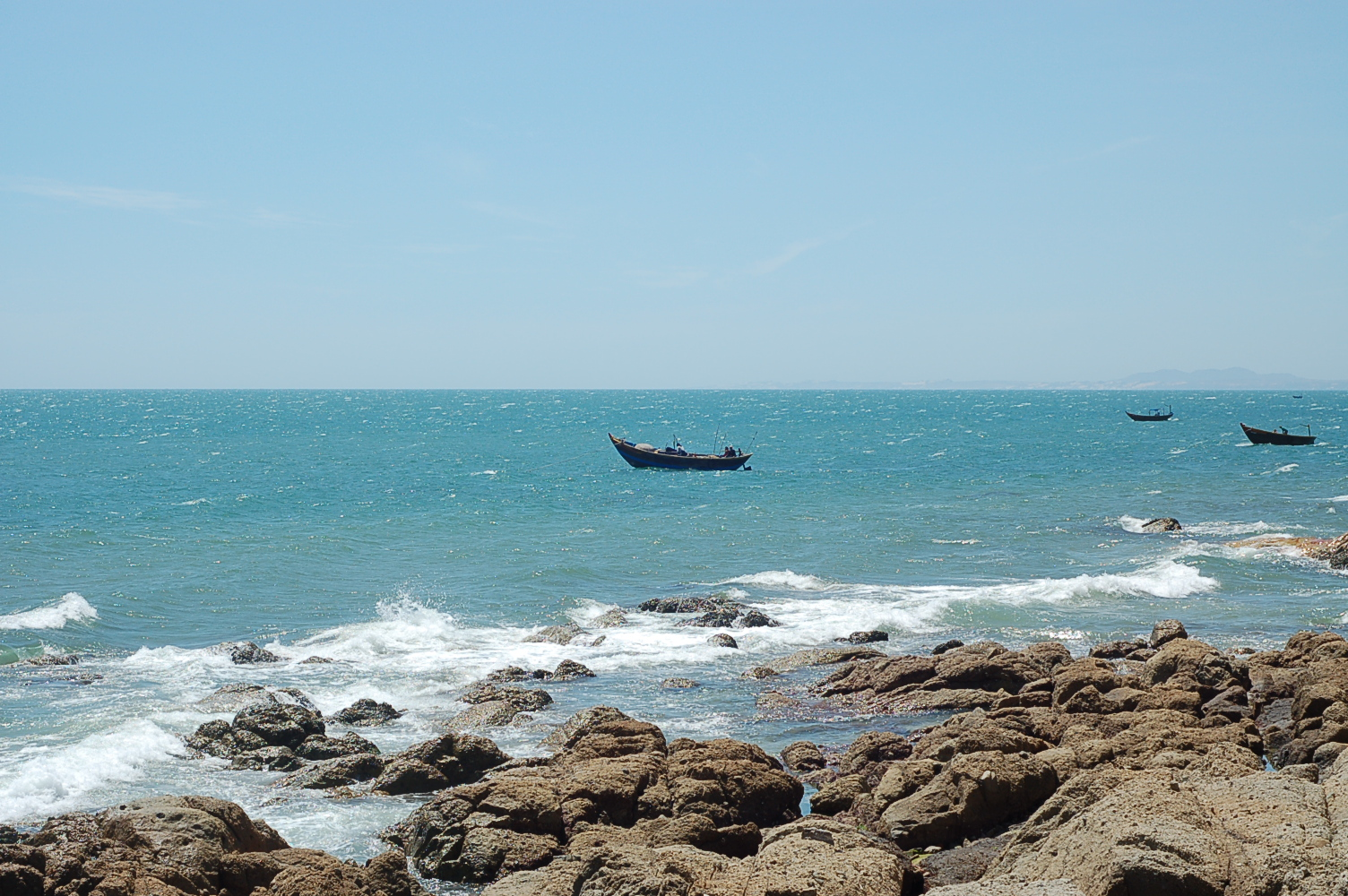 Mui Ne, Phan Thiet, Vietnam.